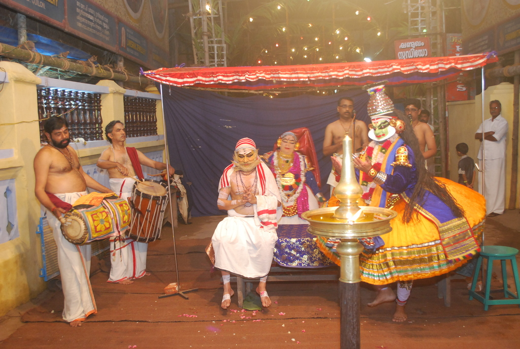 Kuchelavritham kathakali, Kathakali performed at Unichakom veedu temple, Vadayattukotta,Kollam. Padmabooshan Madavoor Vasudevan as Kuchelan Kalamandalam Rajeev as Sreekrishnan